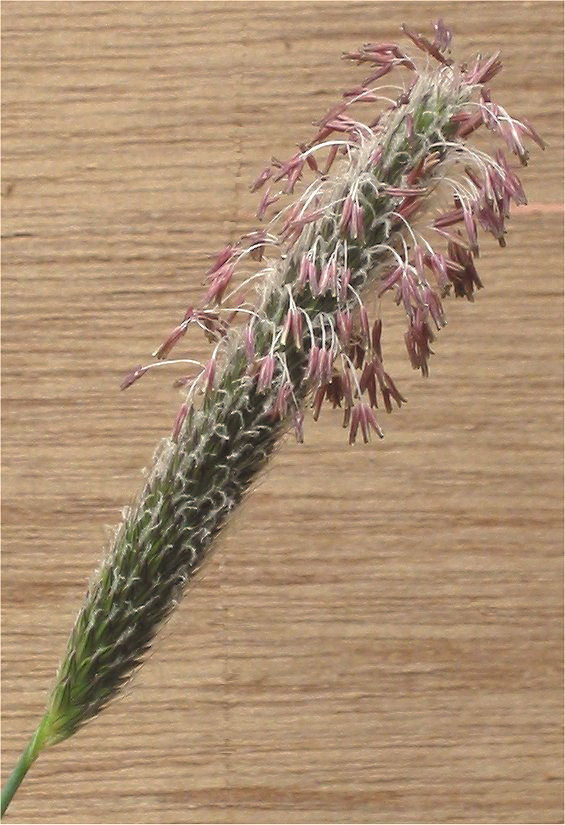 Alopecurus pratensis Grote vossenstaart